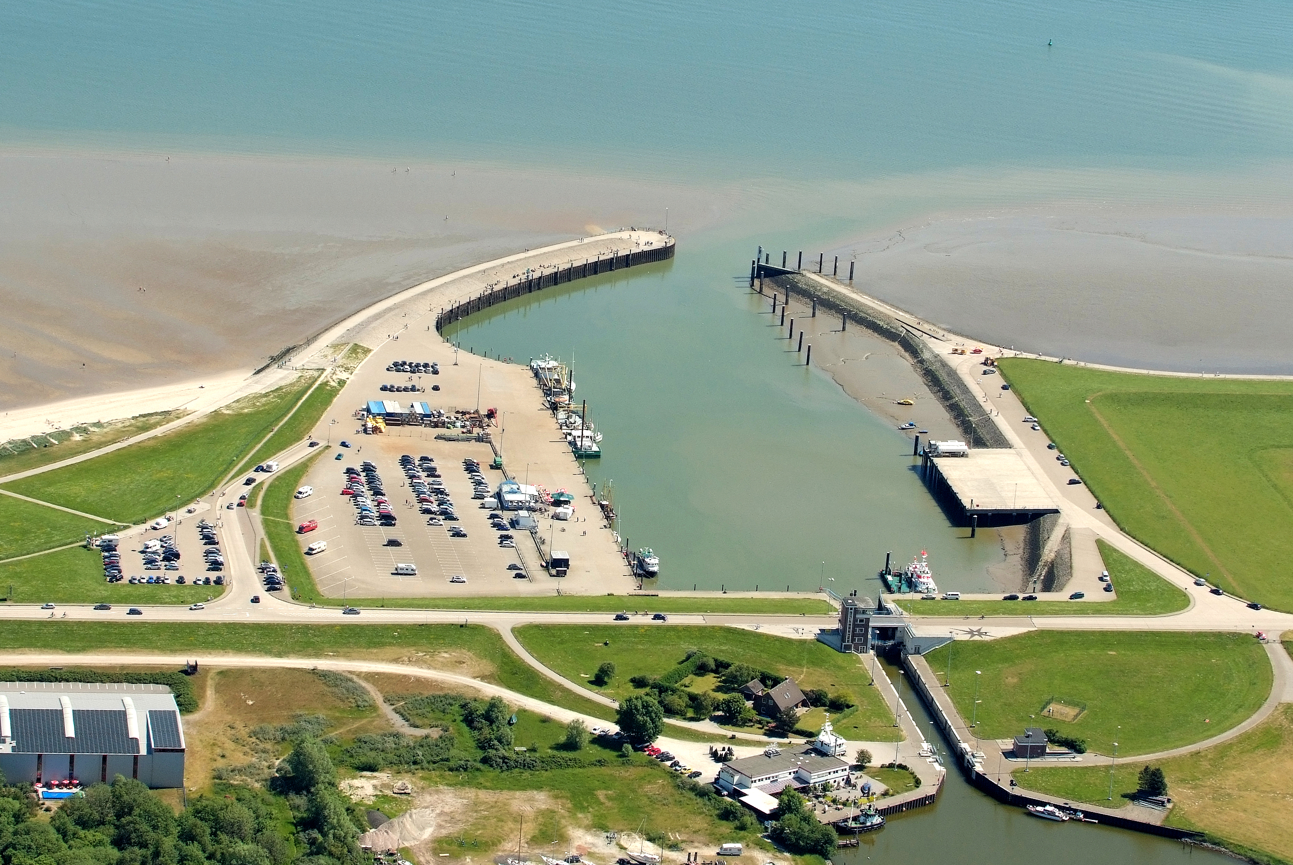 Hooksiel-Außenhafen von Westen gesehen Fotoflug vom Flugplatz Nordholz-Spieka über Cuxhaven und Wilhelmshaven